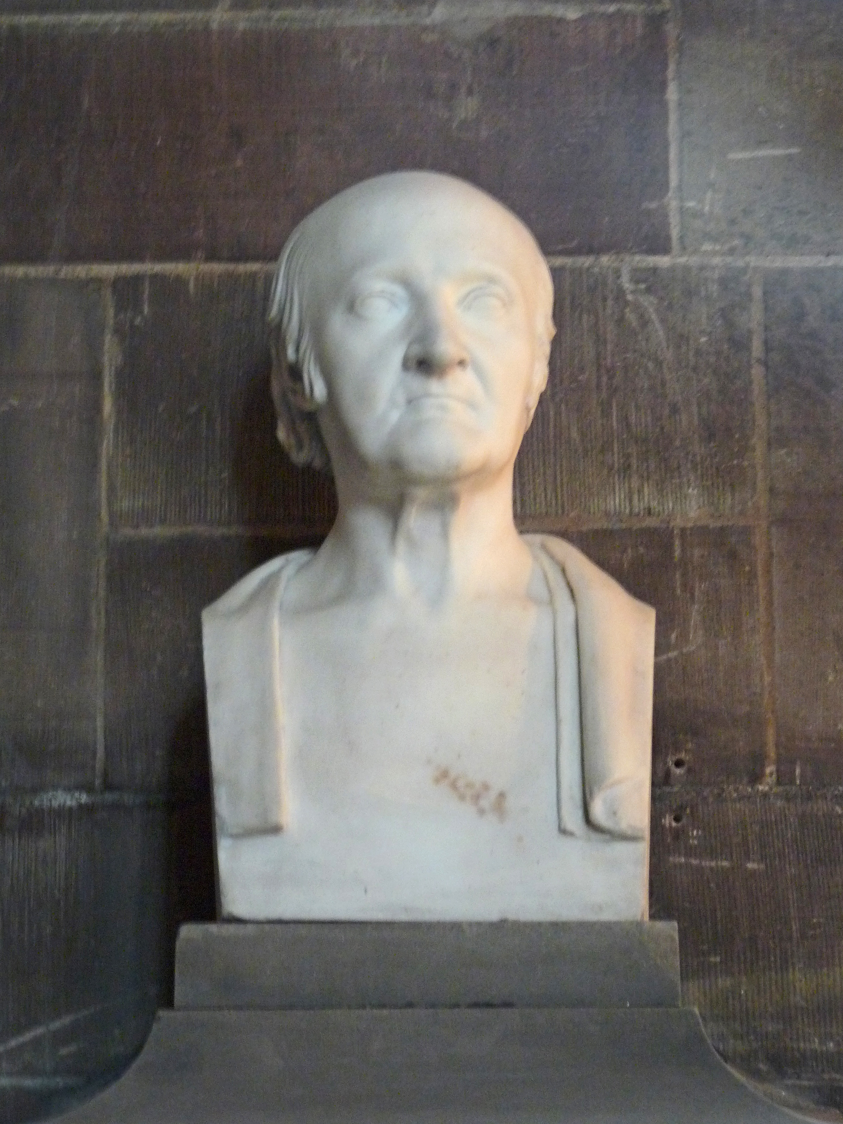 Strasbourg, Temple Neuf : buste en marbre de Bernard-Frédéric de Turckheim par Landolin Ohmacht.